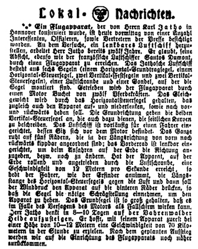 Hannoverscher Courier, No 26955, Bericht: Ein Flugapparat, Donnerstag 1. August 1907